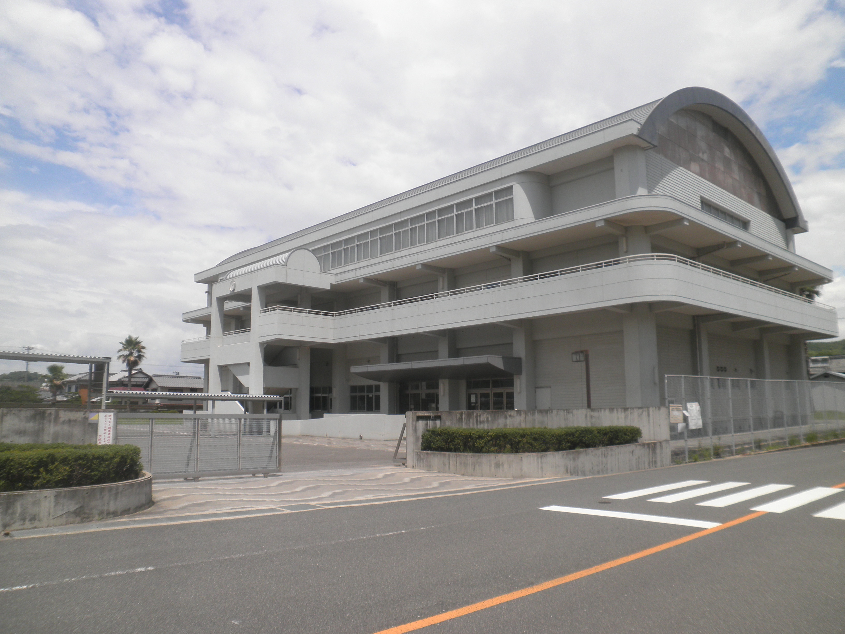 広島県の大崎上島、大崎海星高校